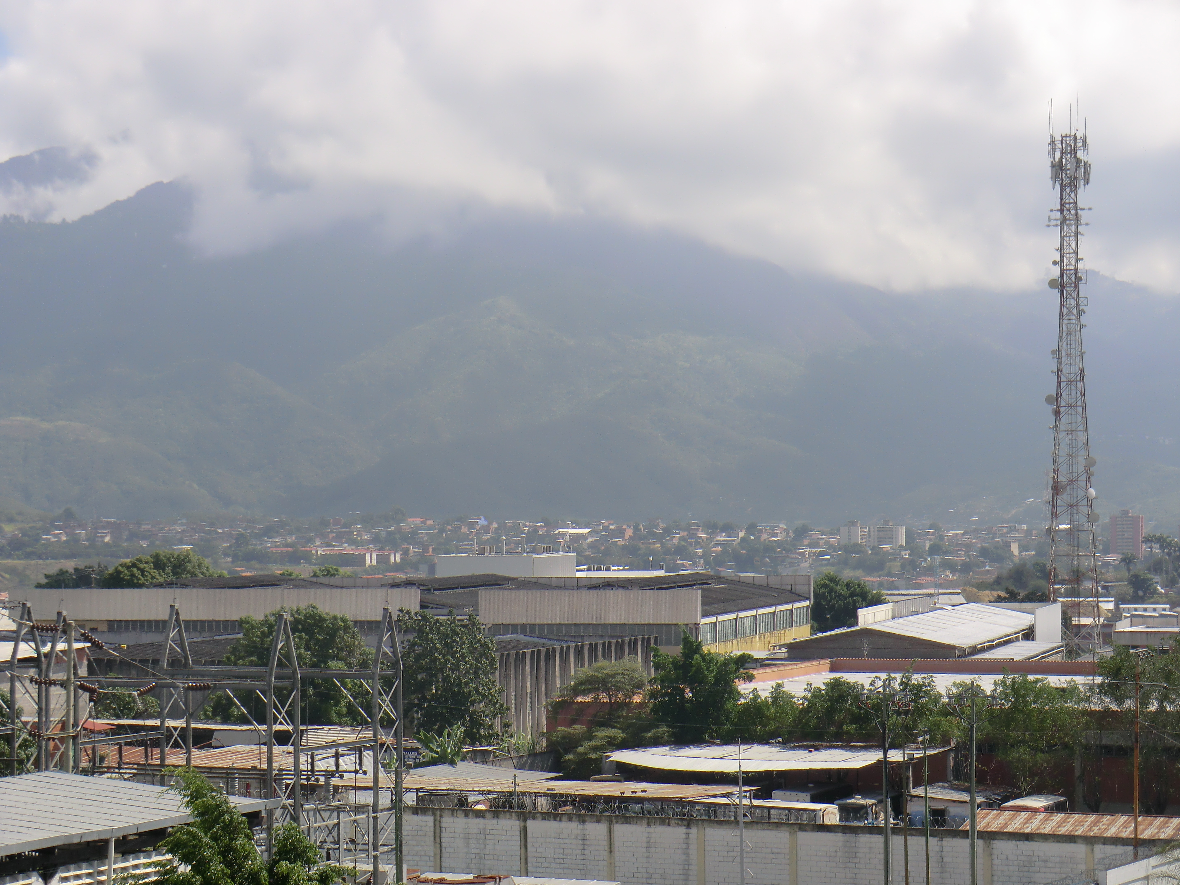 Una vista de la ciudad de Guatire. Al fondo puede verse parte de la Serranía del Interior.